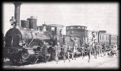 Train of Hessische Ludwigsbahn in Alzey station